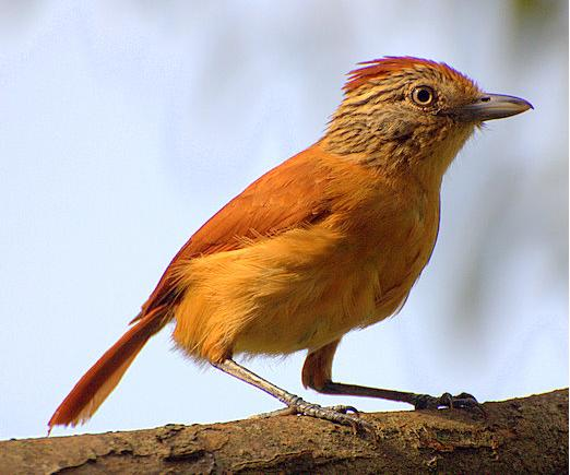 Thamnophilus doliatus Piraju-SP, no Jardim da cadeia"